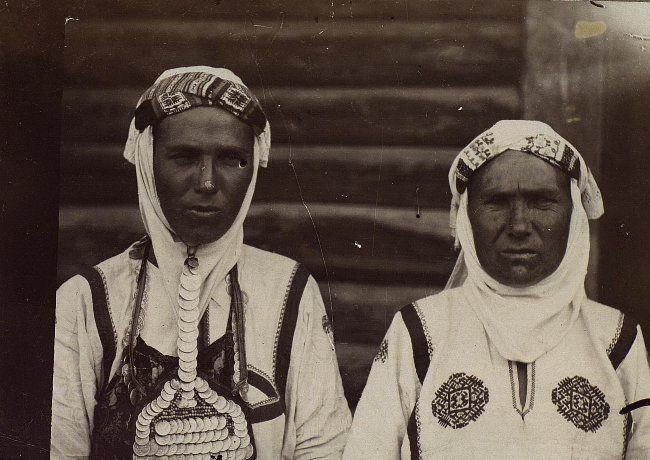 Образец головного убора замужней женщины. Чуваши верховые. Чувашия, Цивильский р-он (Казанская губ., Цивильский уезд). Начало XX века.